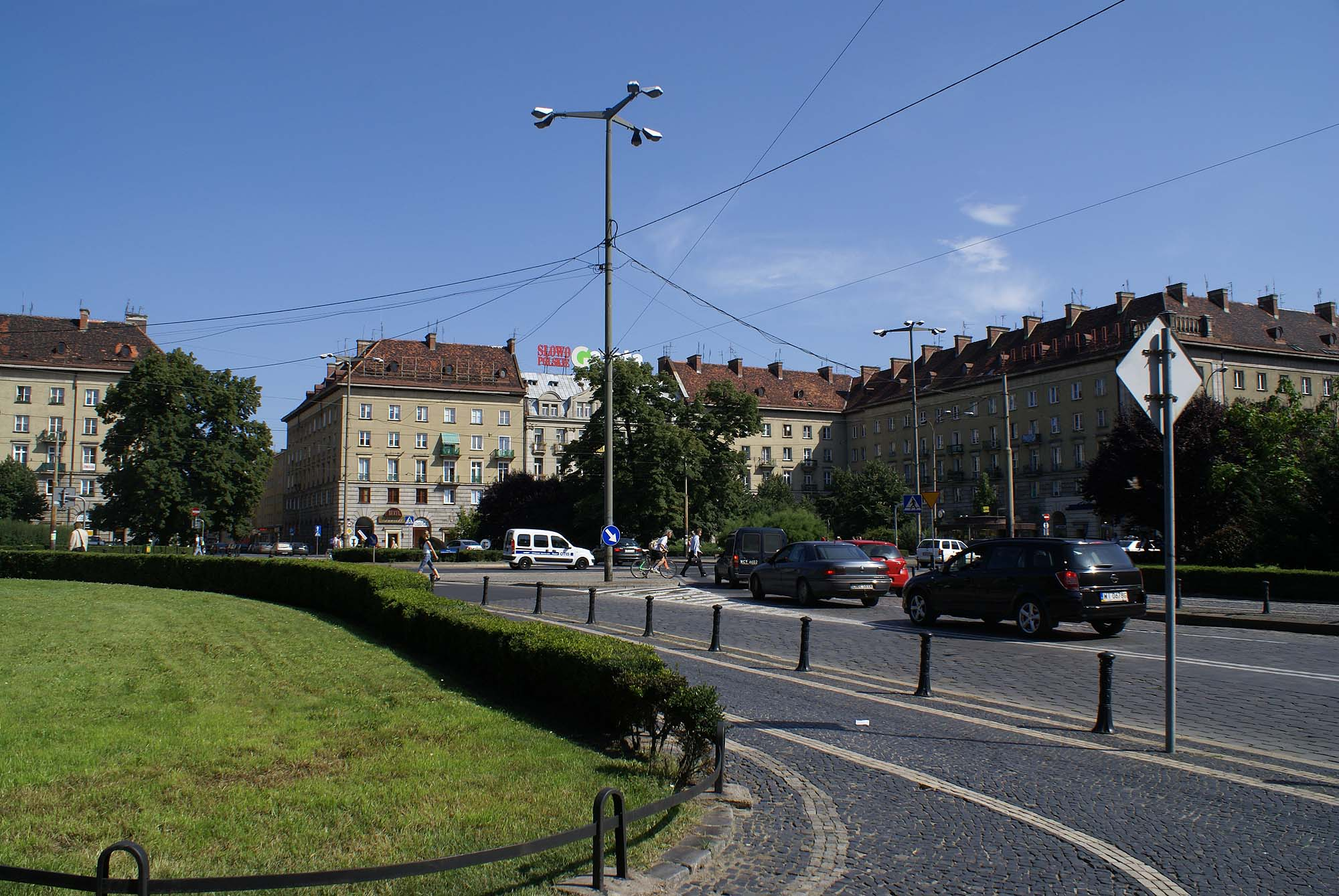 Wrocław, układ urbanistyczny rejonu placu Kościuszki, 1807